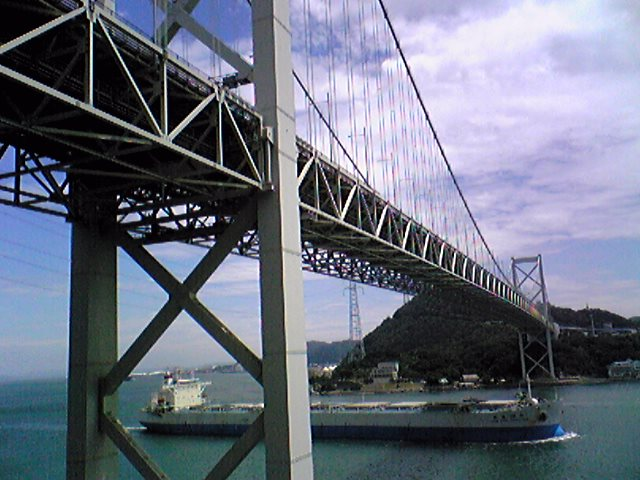 関門海峡にかかる関門橋と輸送船。(撮影者:利用者 伊達政宗、撮影場所：関門海峡の九州側)